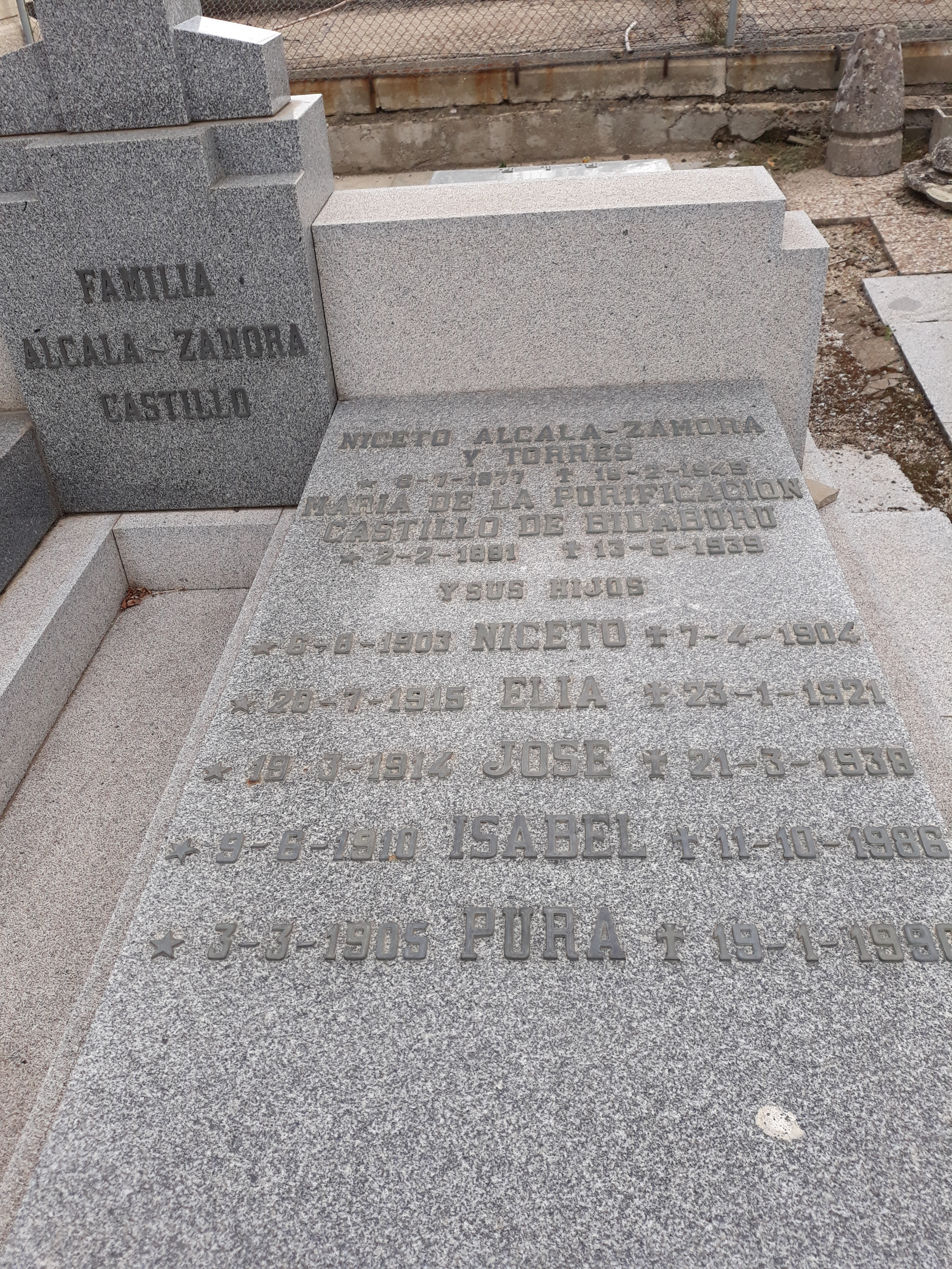 Das Familiengrab des spanischen Staatspräsidenten Niceto Álcala-Zamora auf dem Almudena-Friedhof in Madrid.